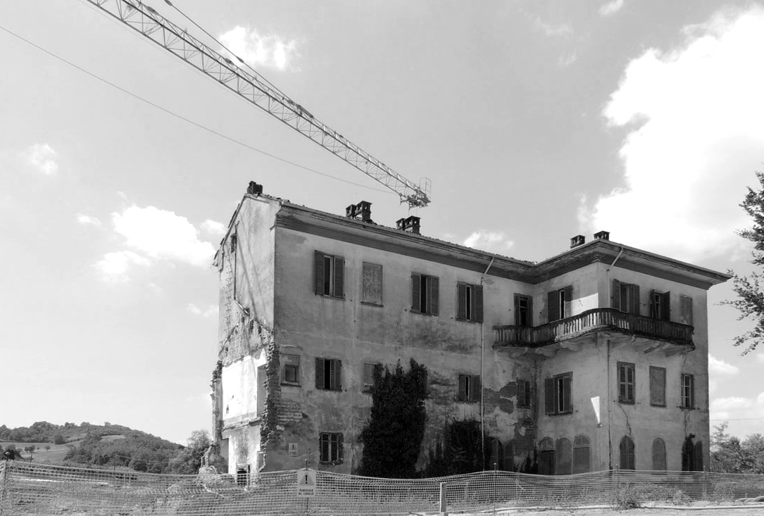 Immagine ritrae l'antico edificio prima della ristrutturazione